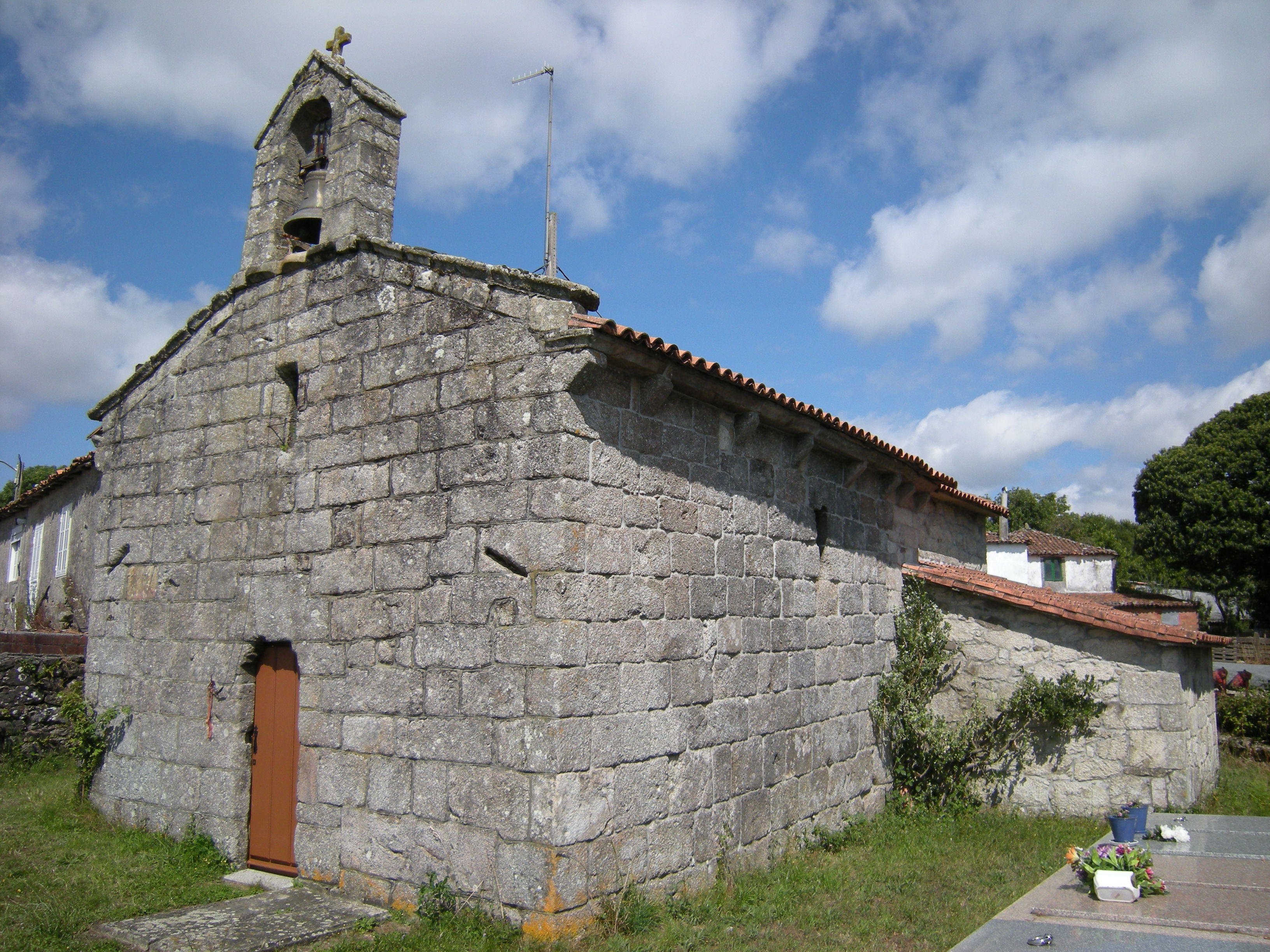 Iglesia de Santa María do Bispo